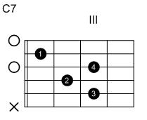 Eigenanfertigung